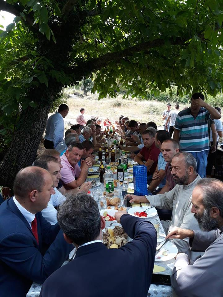 Требијови